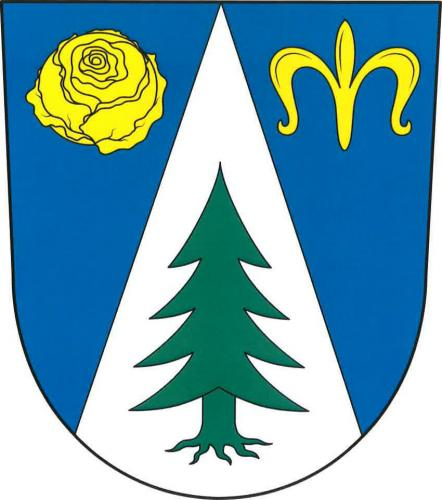 znak obce Čáslavsko